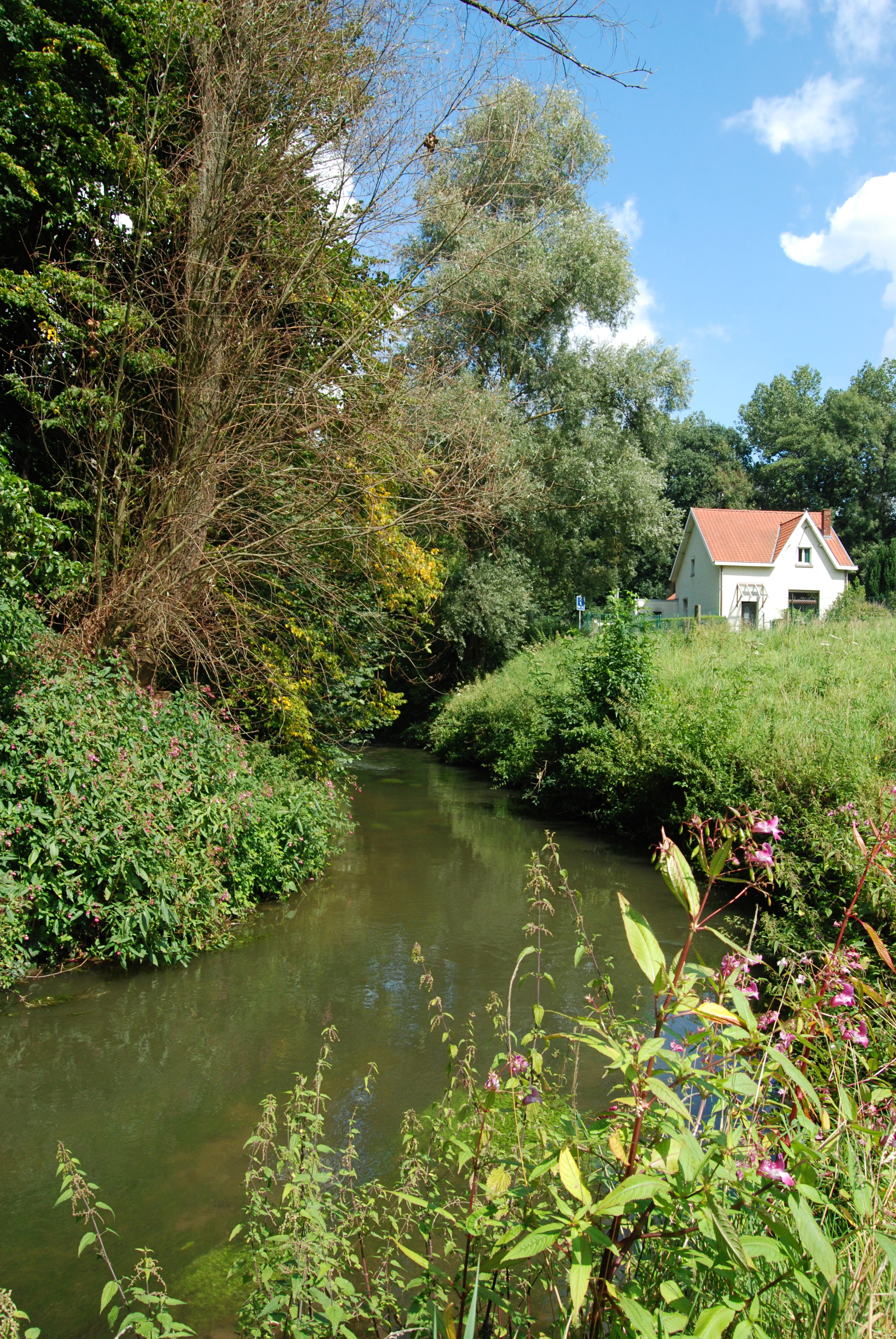 Belgique - Brabant wallon - Ottignies - la Dyle à la sortie d'Ottignies